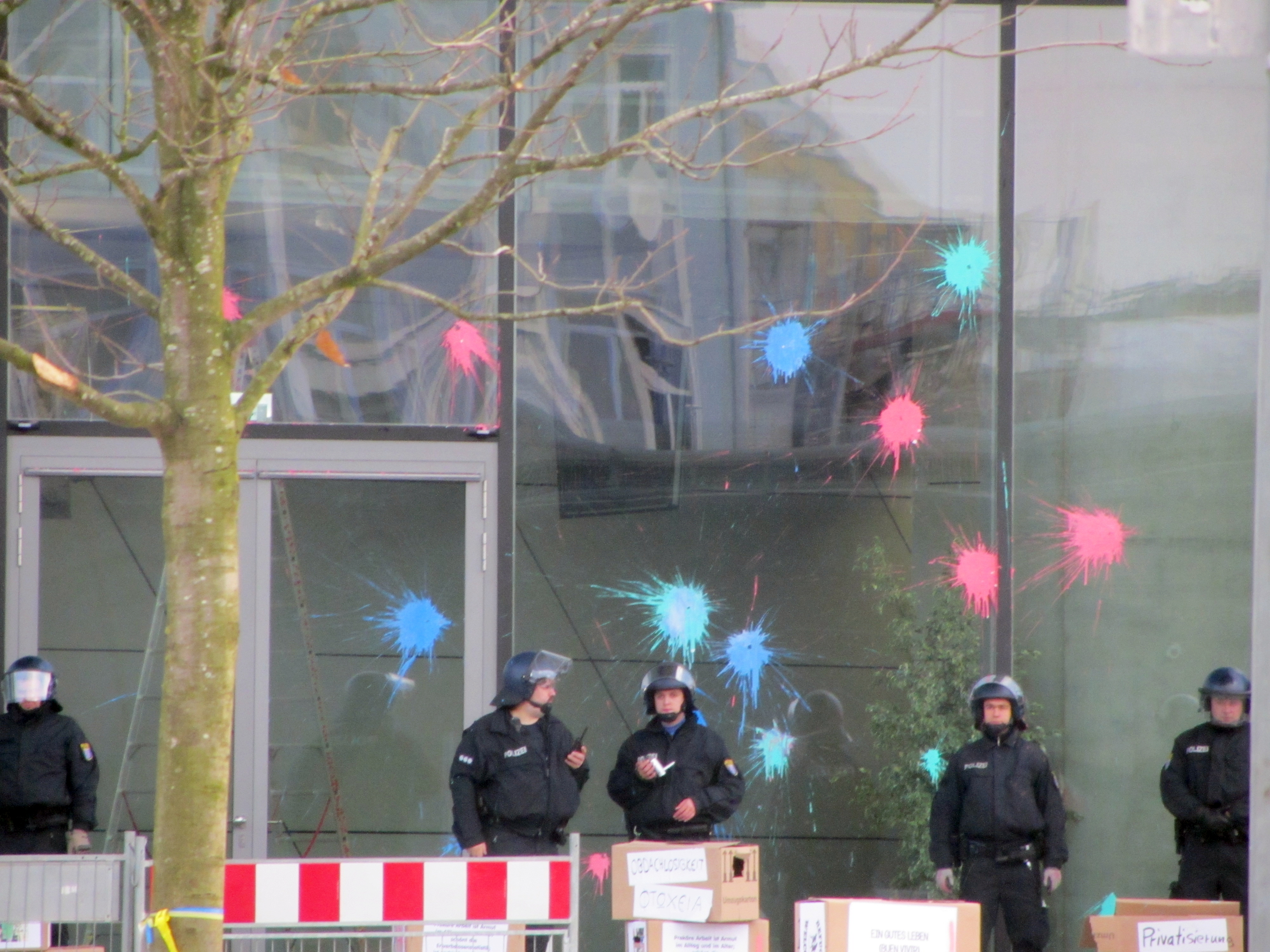 Farbbeutel an der Fassade des EZB-Neubaus